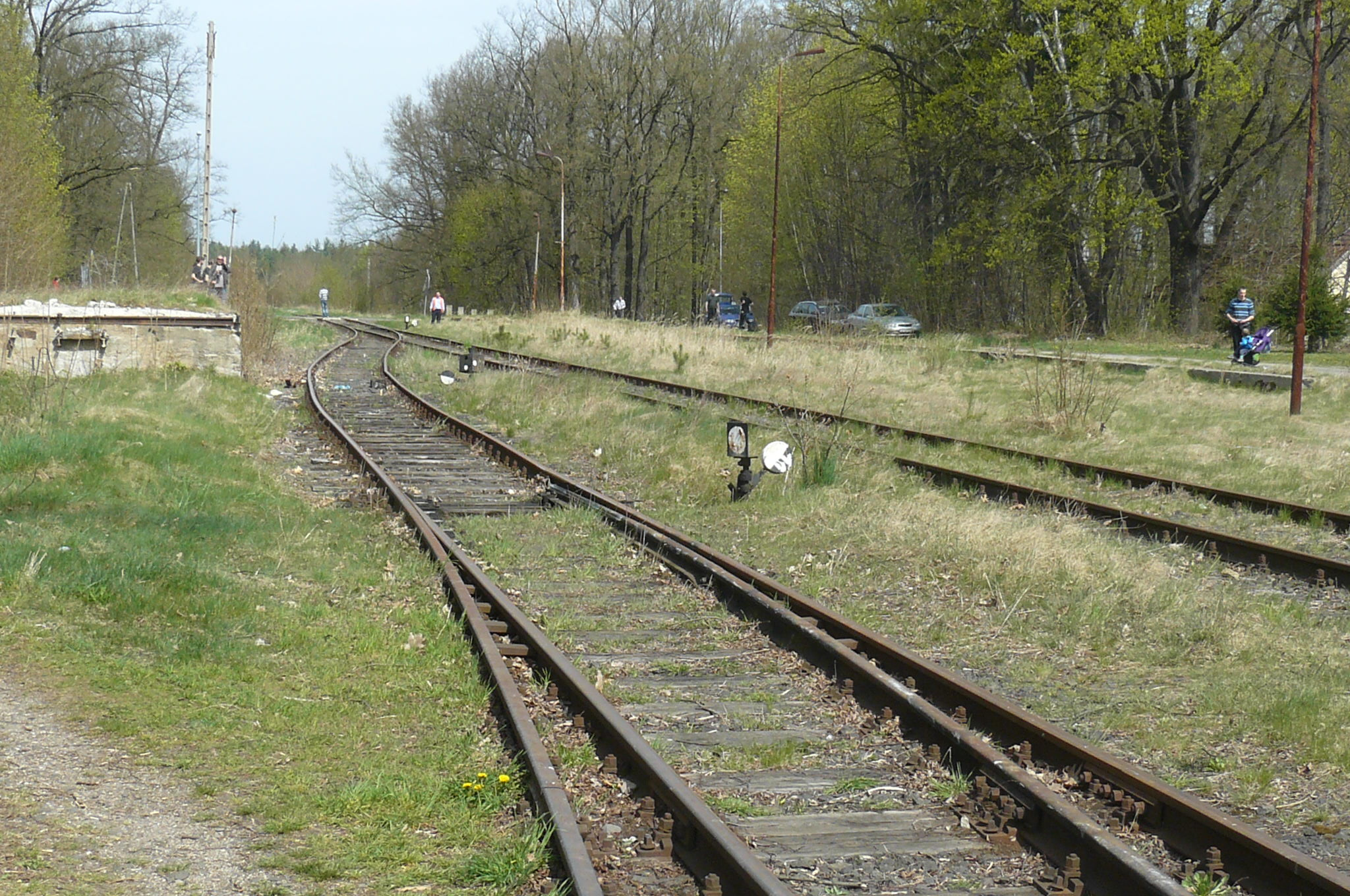 Osiecznica Kliczków - torowiska w kierunku Żagania.